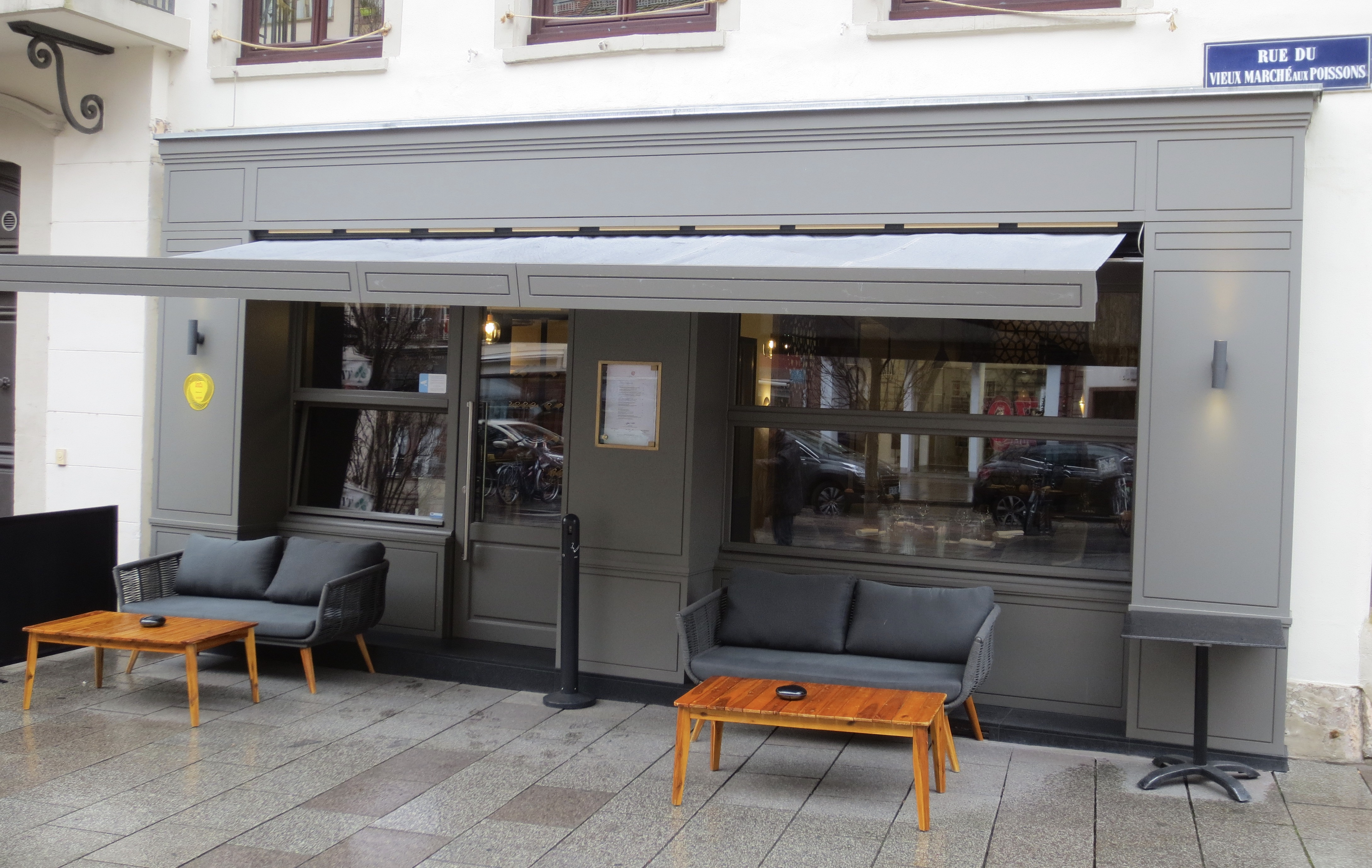 Strasbourg - Restaurant Maïence, 7 rue du Vieux-Marché-aux-Poissons - Cédric Moulot